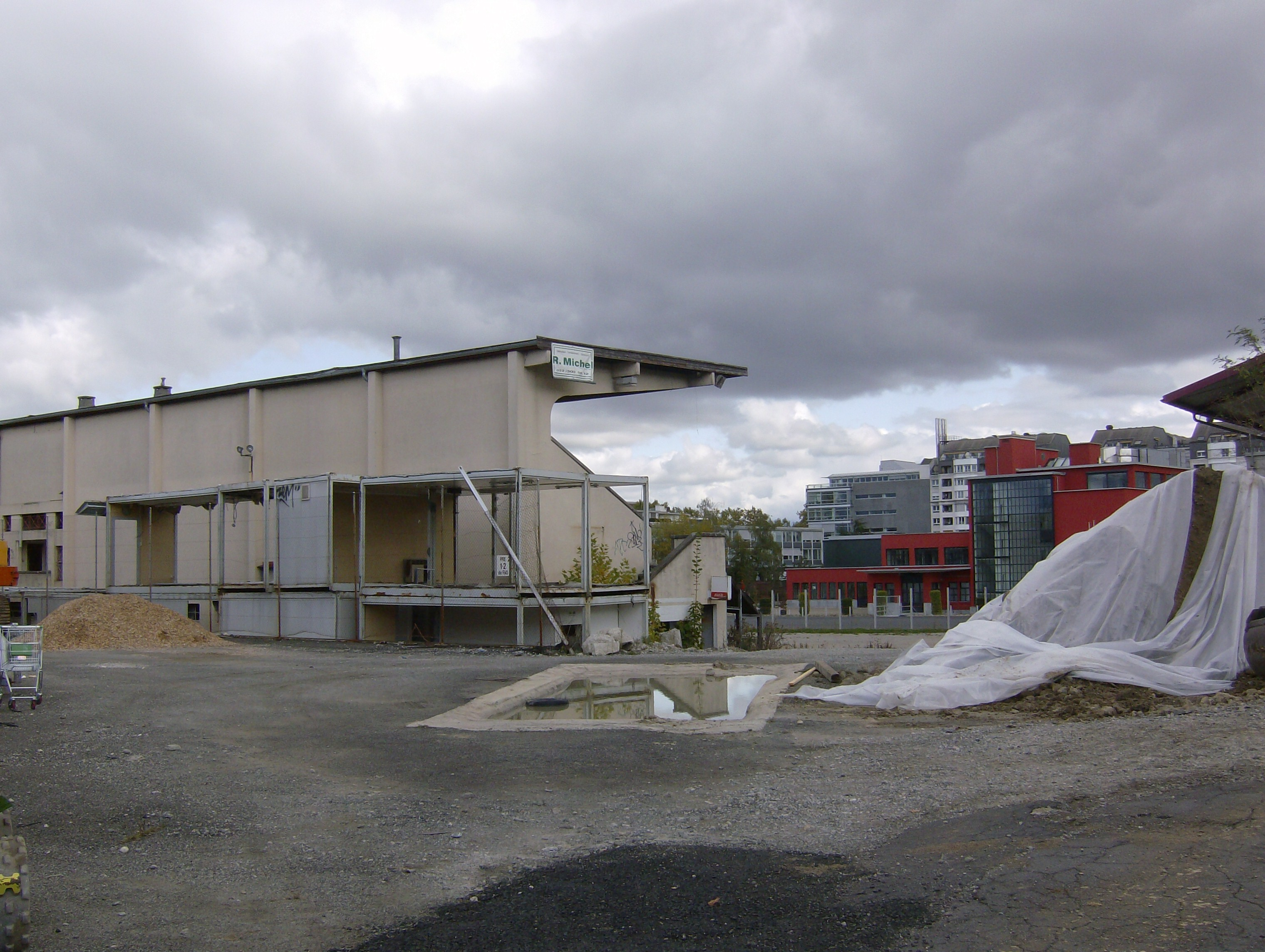 L'ancien stade des Charmilles